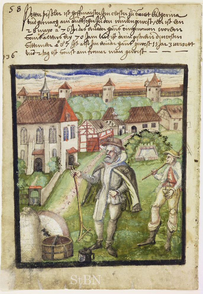 Petter (Peter) Pißler (Pißler; Pissler), Hoffmaister (Hofmeister; Mühlenaufseher (Verwalter) des Klosters zu Sankt Katharina) Transkription und weitere Informationen